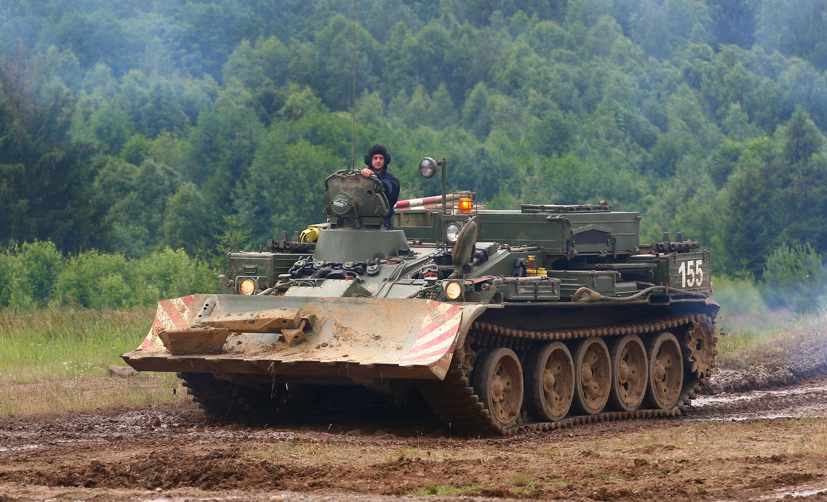 Vojenská technika zaznamenaná při dynamických ukázkách na Dni pozemního vojska BAHNA 2018, který pořádá Velitel společných sil a Nadace pozemního vojska AČR.